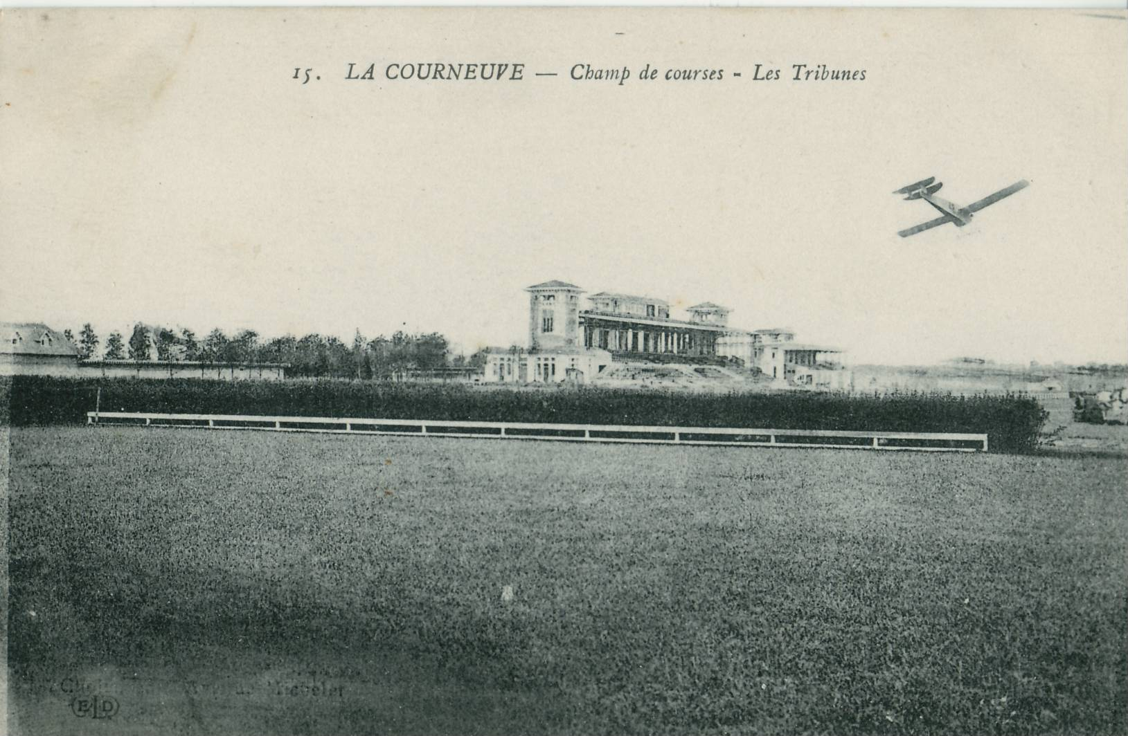 Carte postale ancienne éditée par EM, n°15LA COURNEUVE : Champ de courses - Les TribunesIl s'agit de l'actuel Stade Marville, situé à Saint-Denis et La Courneuve. Les tribunes sont à Saint-Denis